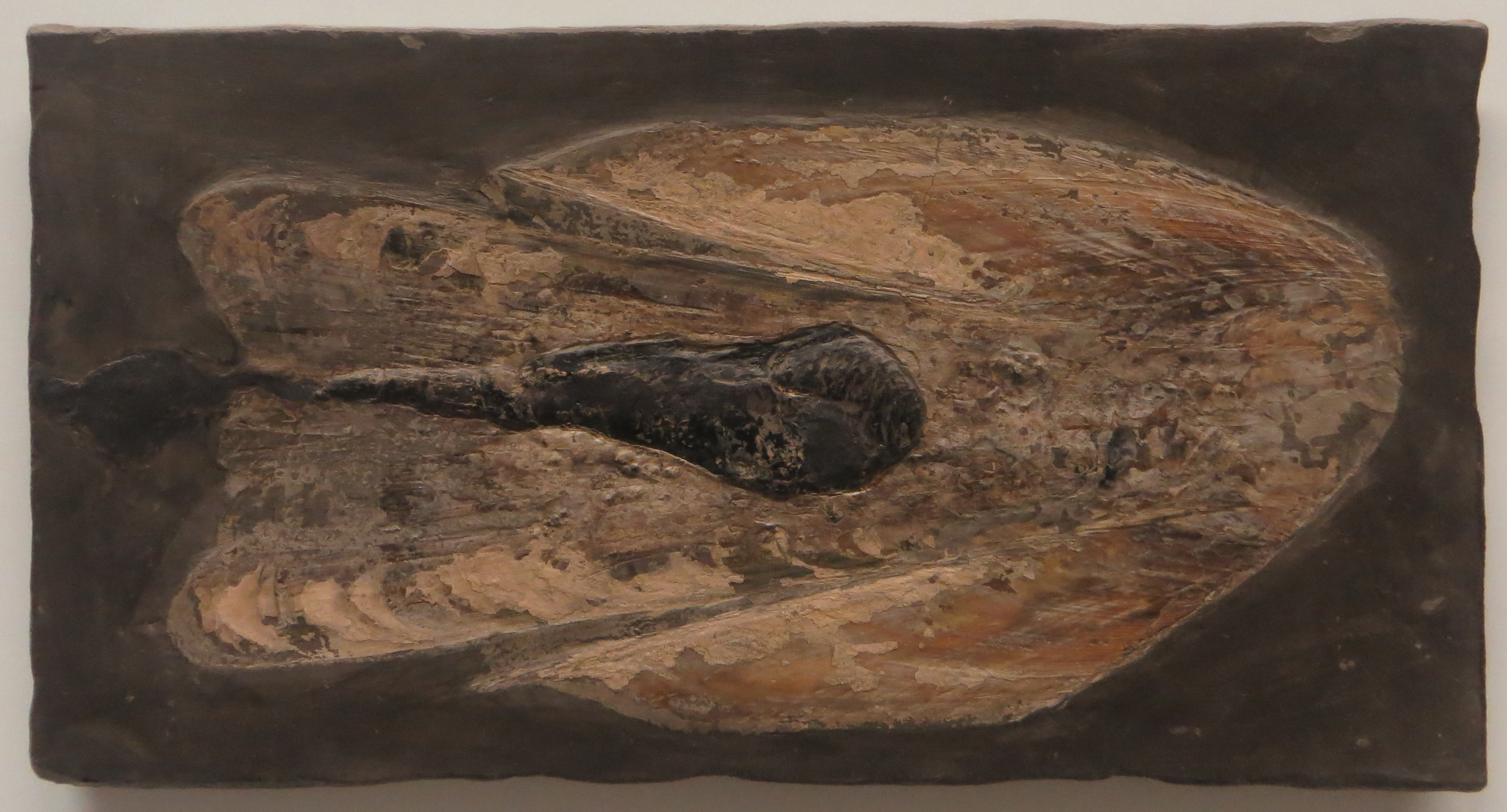 Fossil of Geopeltis- Took the picture at Museum am Lowentor, Stuttgart